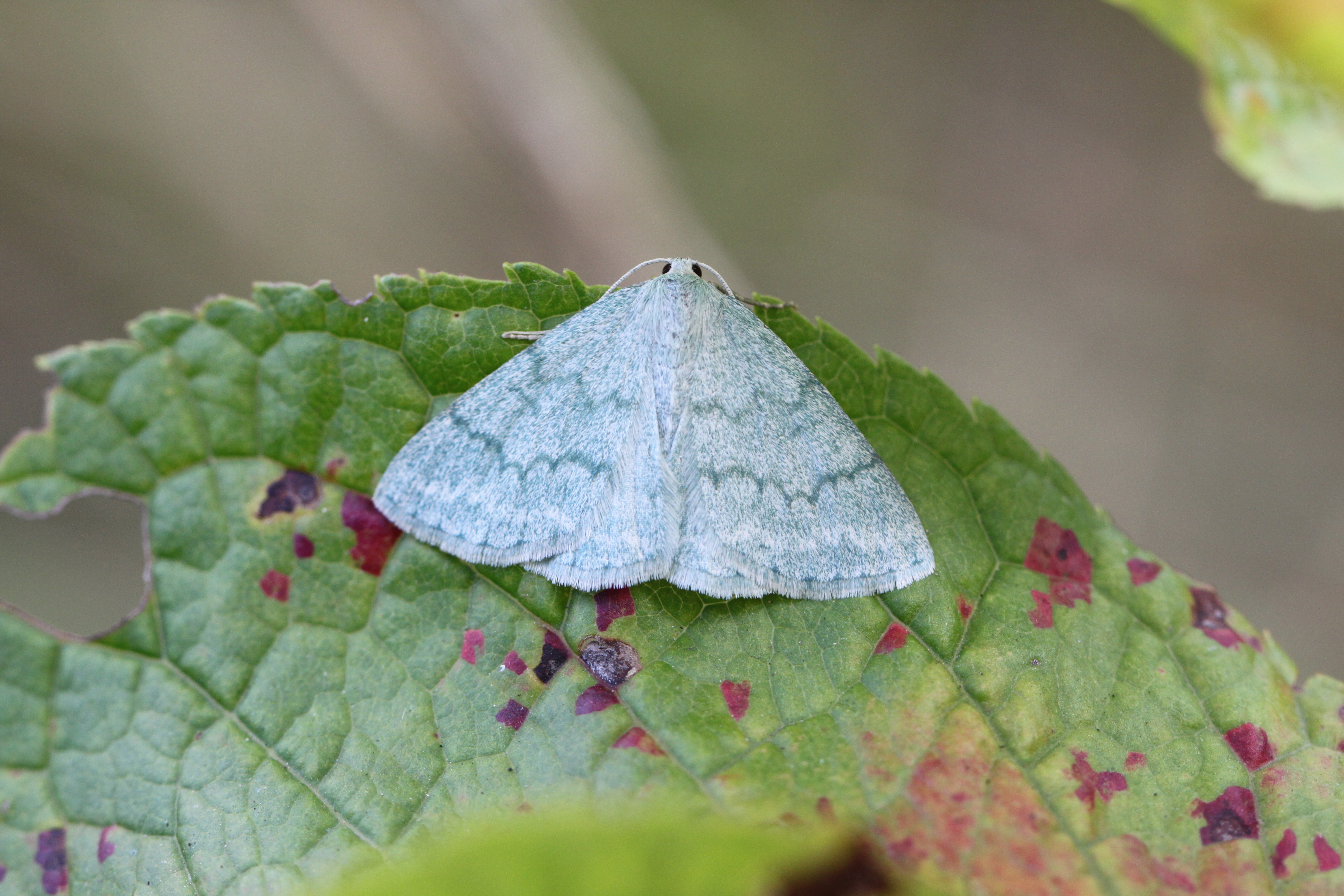 Ginster-Grünspanner (Pseudoterpna pruinata) im Schwetzinger Hardt